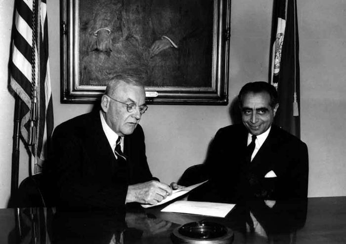 علی امینی در دیدار با جان فاستر دالس (در سمت وزیر امور خارجه آمریکا)